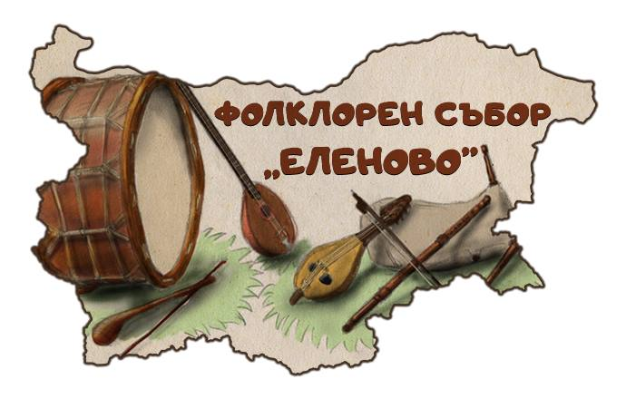 2018г Фолклорен събор село Еленово -афиш